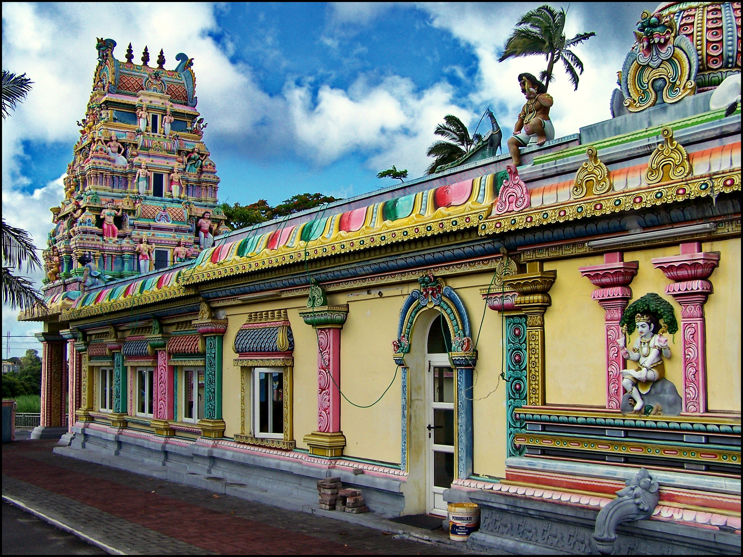 Super temple Tamil, st.Antoine